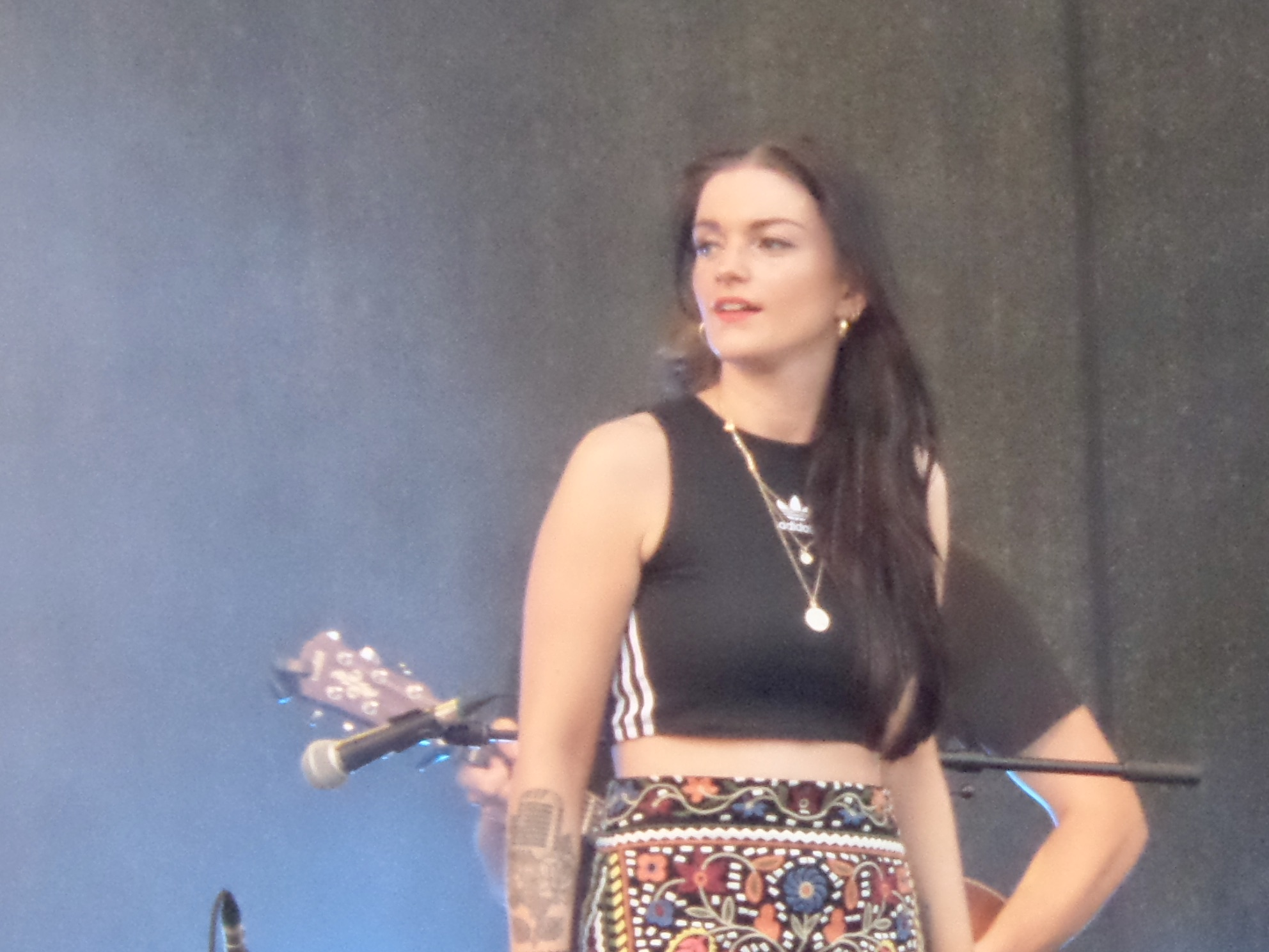 Alyssa Drichel im Vorprogrammm von Tom Beck (2020)